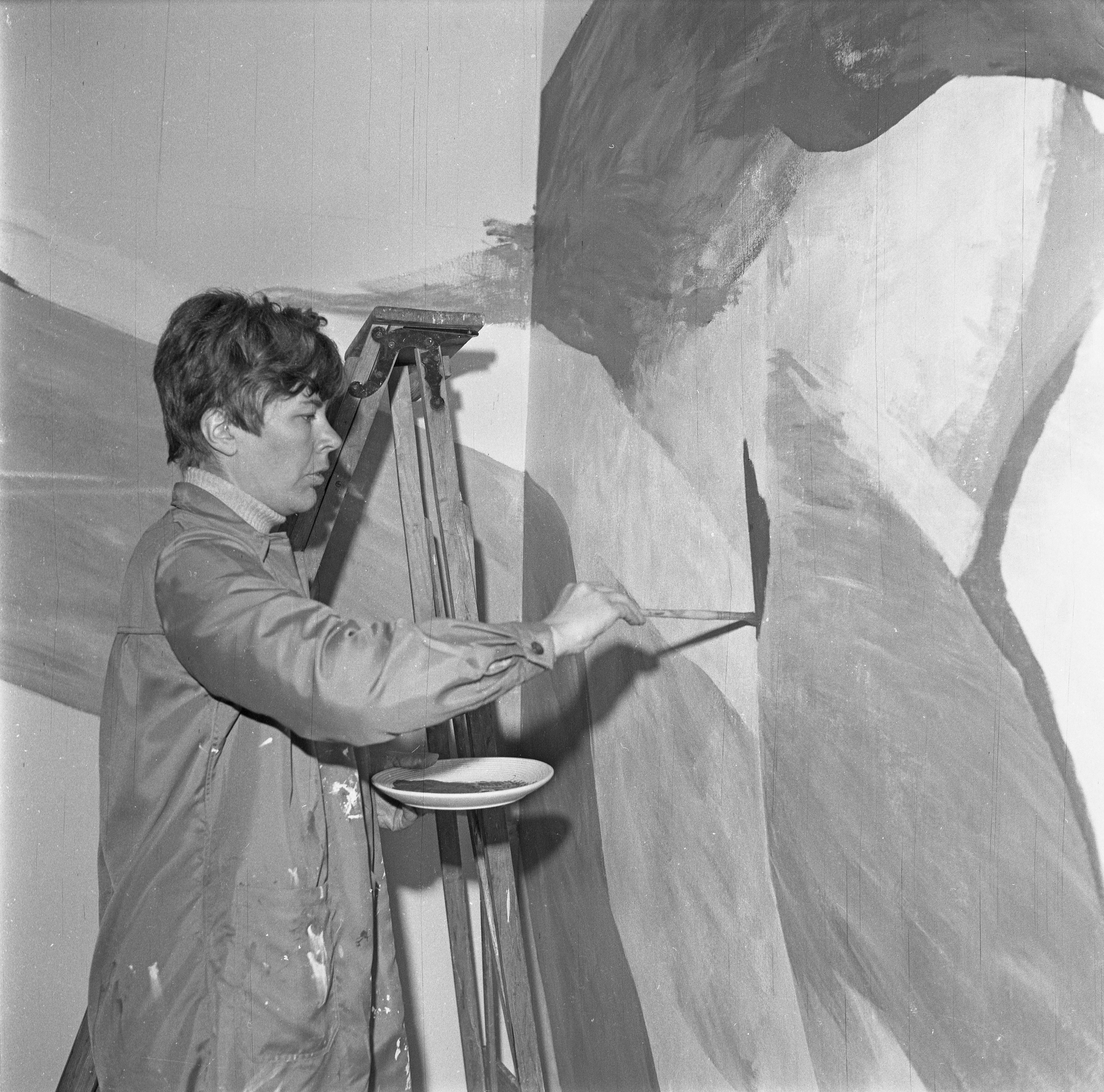 Inger Solveig Sitter (født 18. oktober 1929 i Trondheim) er en norsk grafiker og maler.